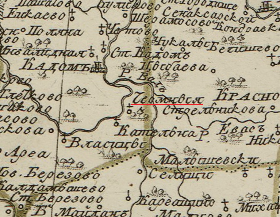 С.Чермные в атласе 1794 г. для юношества. Тульское, Рязанское и Тамбовское наместничества.